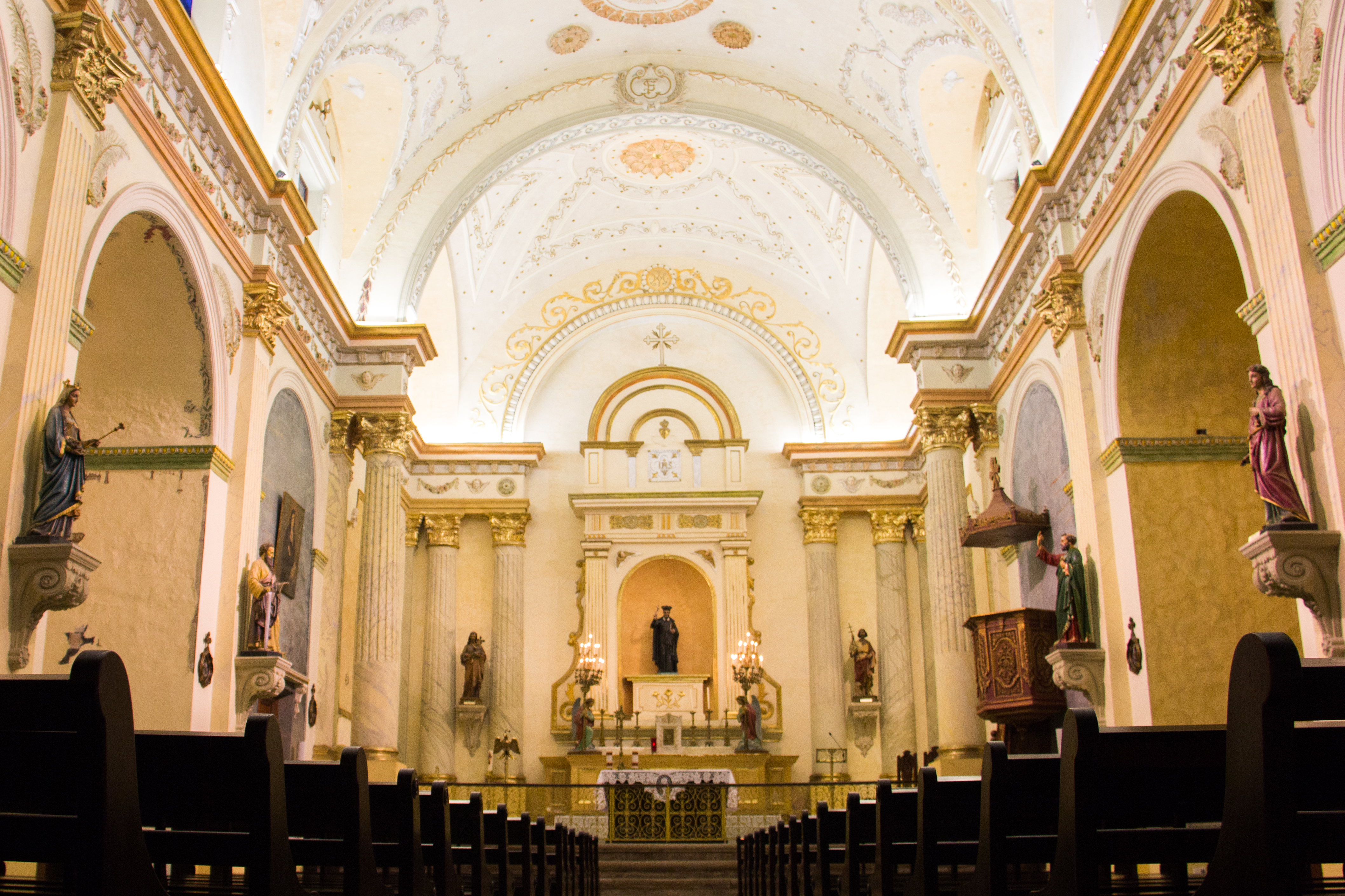 Al ser una iglesia pequeña tiene la nave central y estrechas naves laterales con los nichos para las imágenes religiosas, es decir, es de construcción sencilla. Nos atrae la combinación de dorado y las paredes con un tono entre rosado y amarillo. Esta iglesia, pasa casi desapercibida, por tener una construcción moderna en su fachada principal. Se considera que se terminó de construir en 1688, por la fecha que aparece en la pared que da hacia la avenida B. Es una de las primeras en construirse en la nueva ciudad. Se puede apreciar una torre adornada con conchas de madre perla. Fue afectada por incendios y terremotos, esta iglesia sirvió de catedral